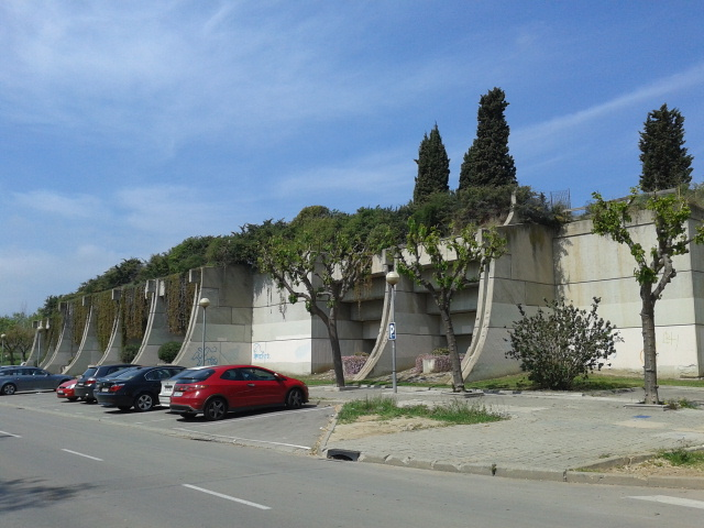 Clos Arqueològic de Torre Llauder